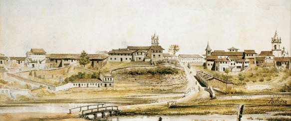 A Várzea do Carmo em 1821, aquarela de Arnaud Julien Pallière, 1821. Ao chegarem do Rio de Janeiro ou de Santos, e já na entrada da cidade pelos lados do Brás, os viajantes tinham o privilégio de observar esta paisagem.